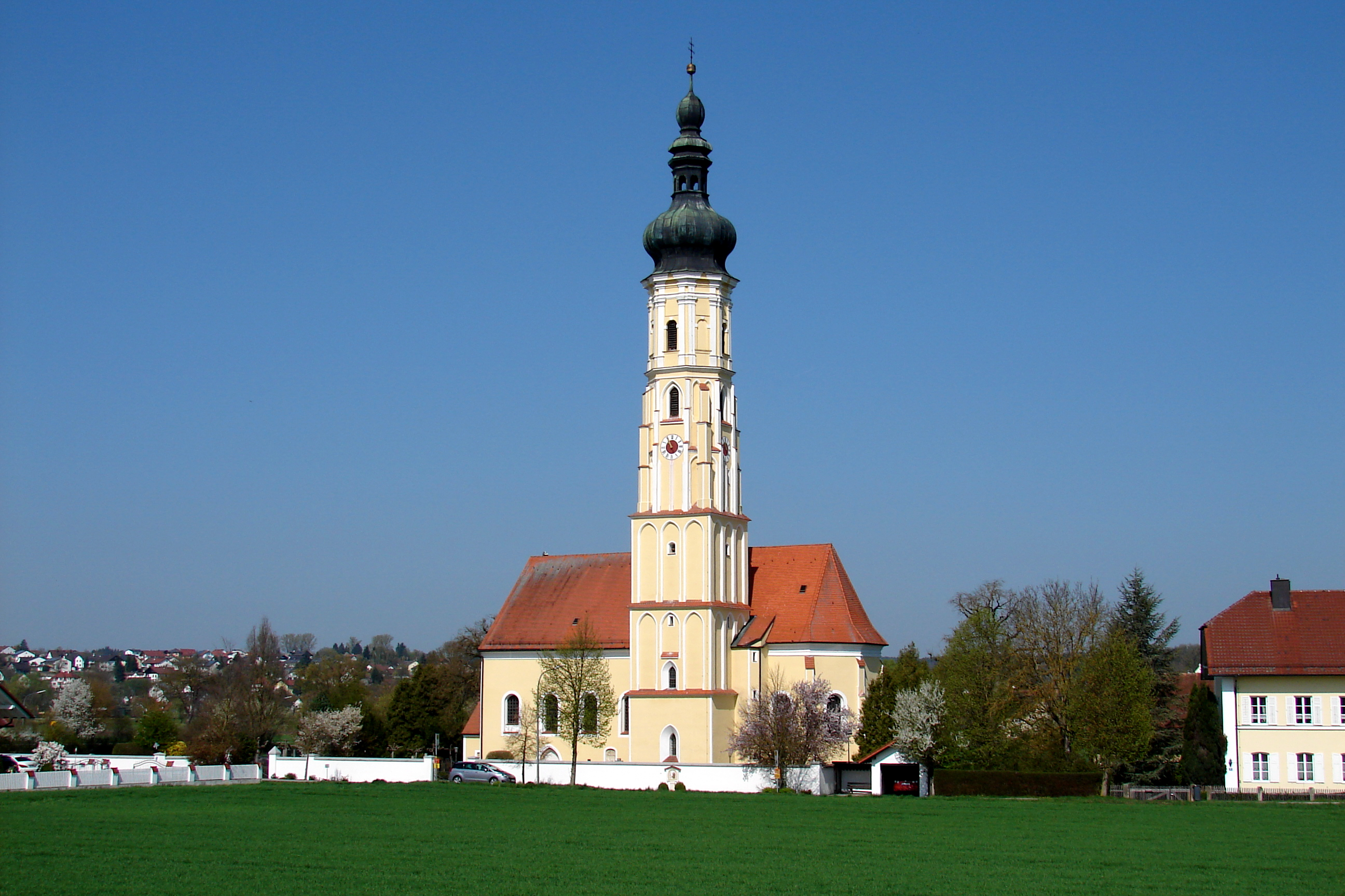 Katholische Pfarrkirche Mariae Opferung in Westen (Mallersdorf-Pfaffenberg).